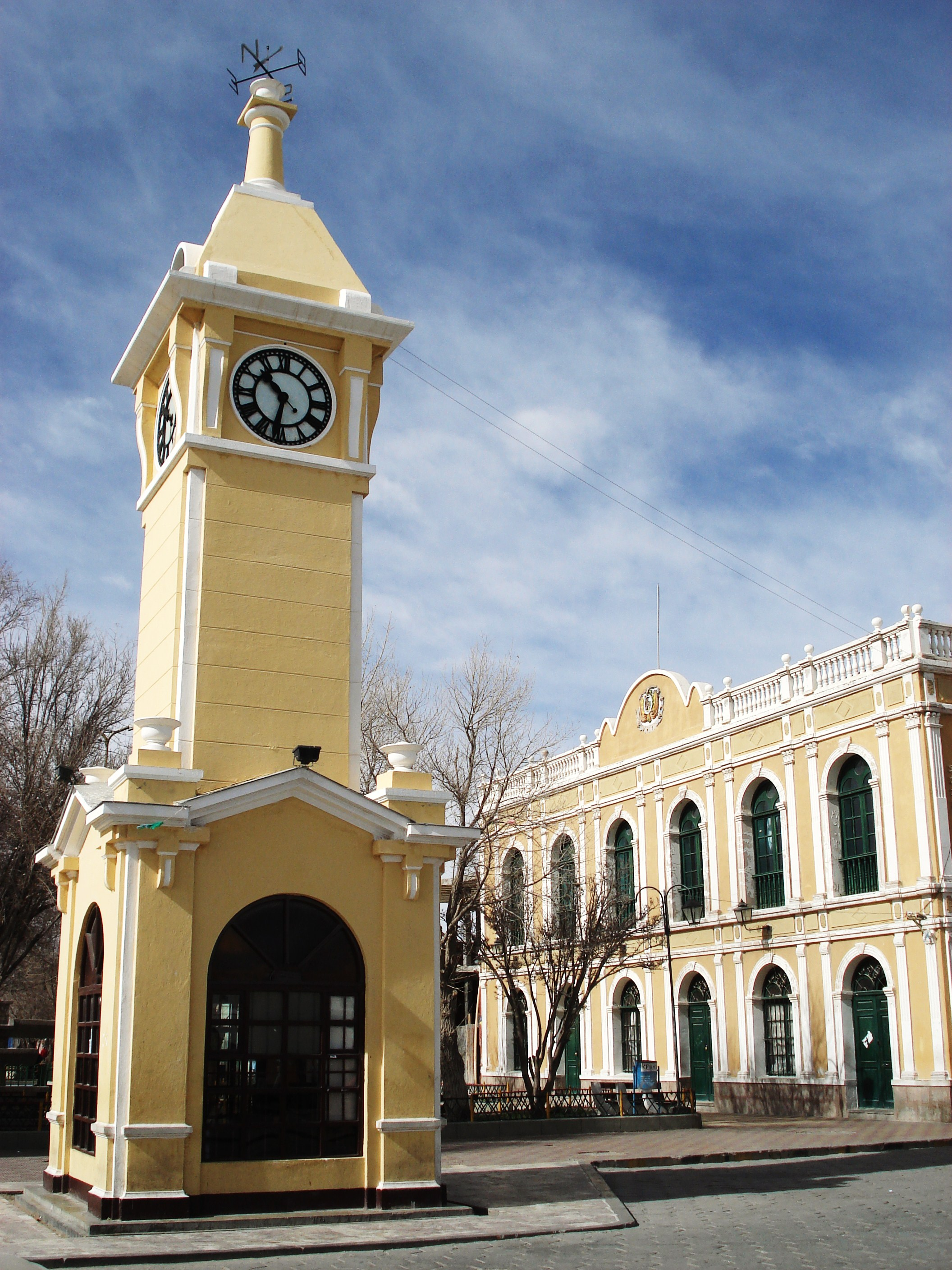 Relógio no centro de Uyuni